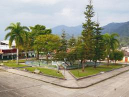 PARQUE CENTRAL SAN ANTONIO